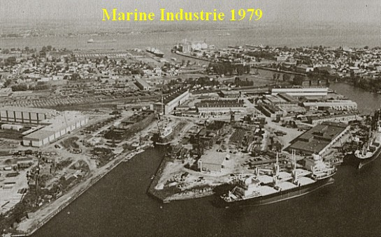 Compagnie Marine Industries de Sorel en 1970